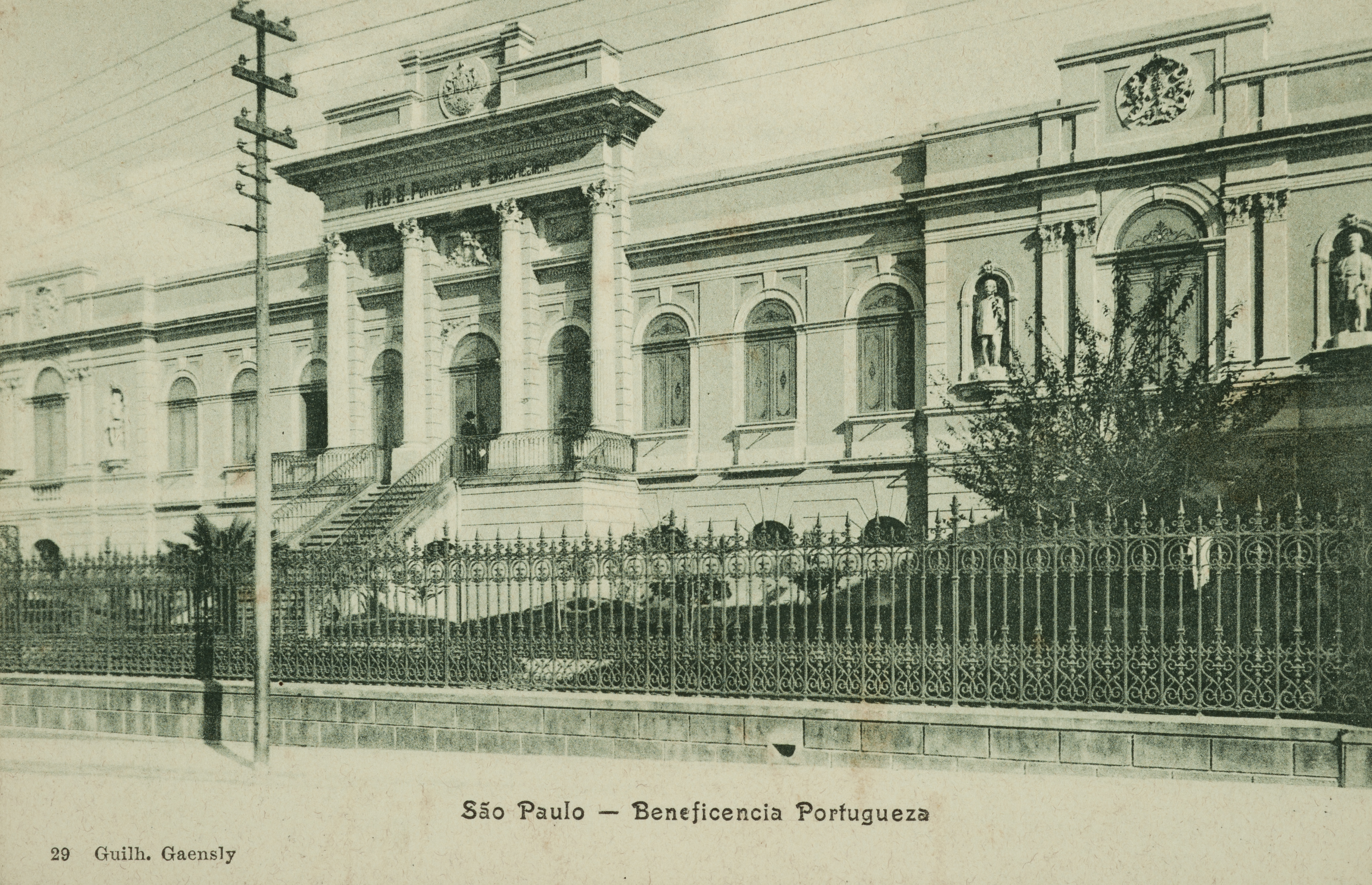 Obra que integra o acervo do Museu Paulista da USP.